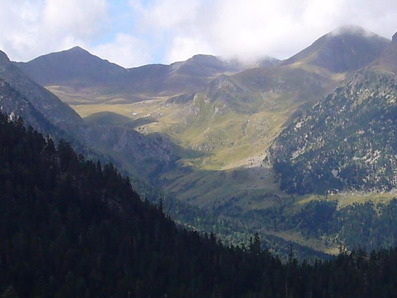 Montanyó de Llacs vist des del Barranc de Contraix; la Vall de Boí, Alta Ribagorça, Catalunya